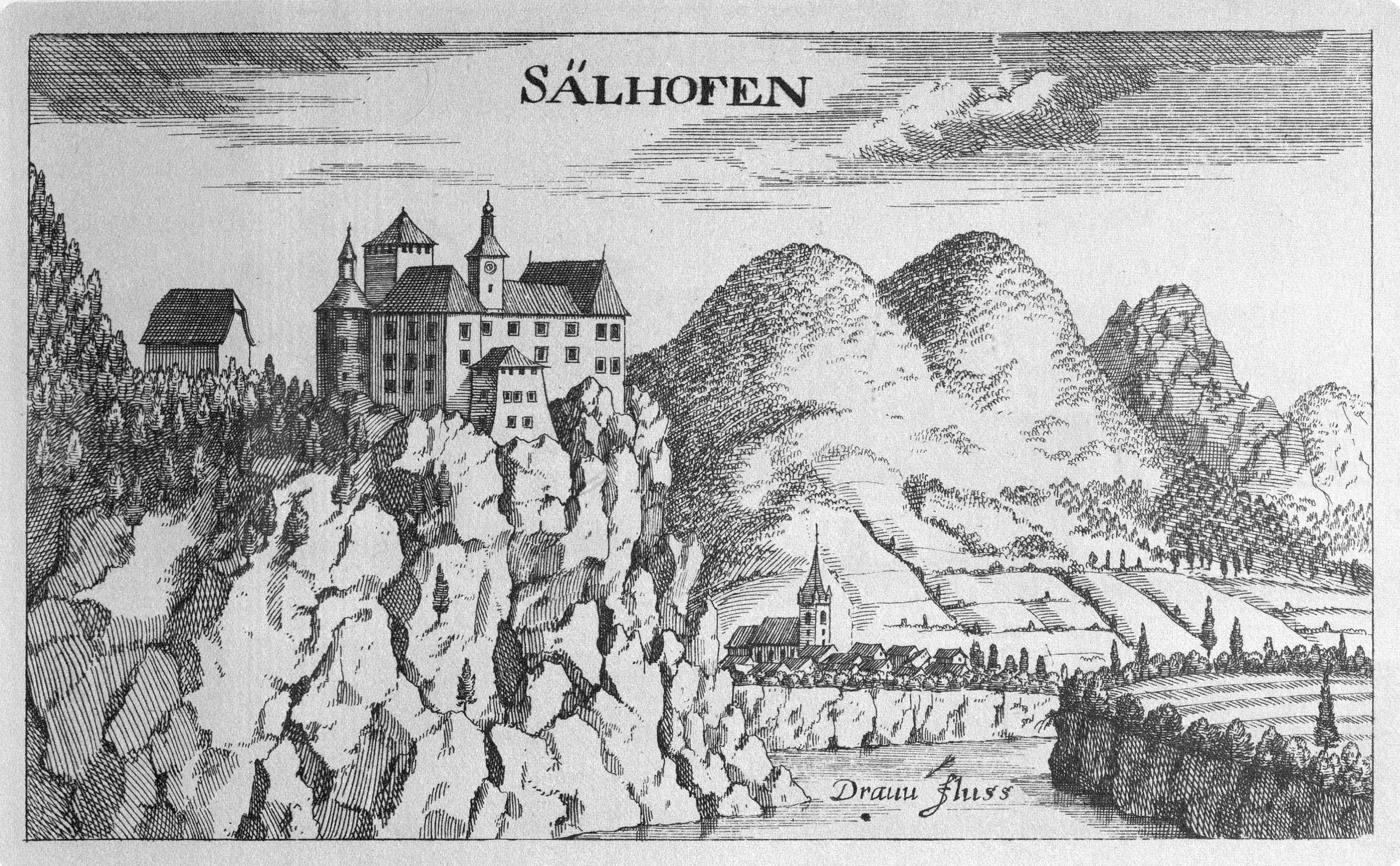 G. M. Vischers Käyserlichen Geographi, Topographia Ducatus Stiriae, Das ist: Eigentliche Delineation / und Abbildung aller Städte / Schlösser / Marcktfleck / Lustgärten / Probsteyen / Stiffter / Clöster und Kirchen / so es sich im Herzogthumb Steyrmarck befinden; Und anjetzo Umb einen billichen Preyß zu finden seynd Bey Johann Bitsch Universitäts Buchhandlern / Auff dem Juden=Platz bey der guldenen Saulen. Graz 1681 Die Nummerierung der Dateien folgt der alphabetischen Reihung der Ortsnamen und entspricht nicht dem Vischer-Register